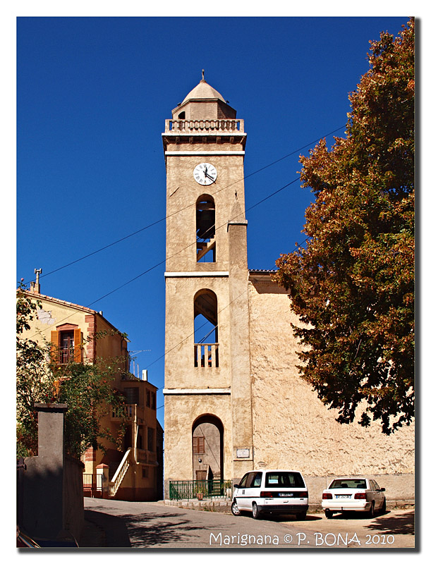 Marignana (Corse) - Église paroissiale Saint-Jacques